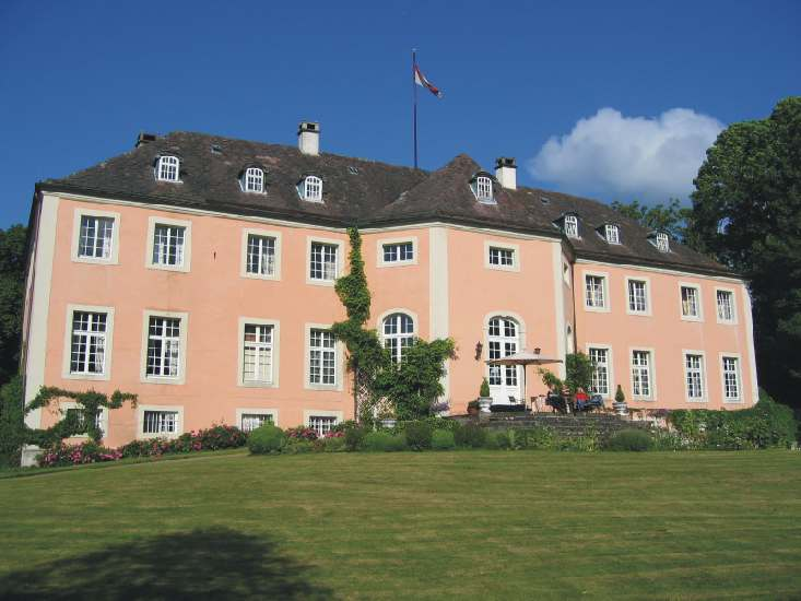 Schloss Rheder/Westf. von der Nethe aus gesehen, Brakel, Kreis Höxter.